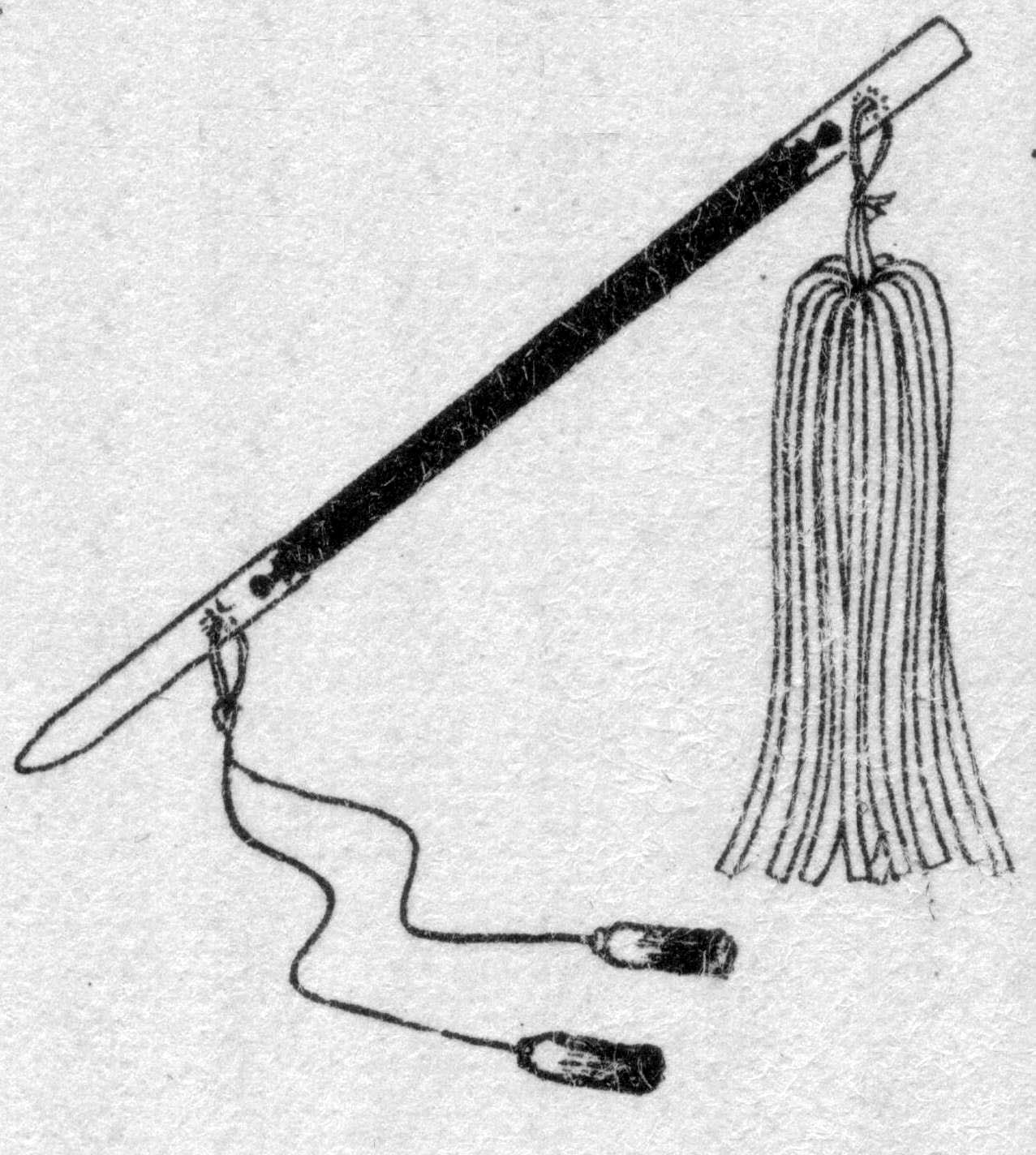 采配(Saihai)